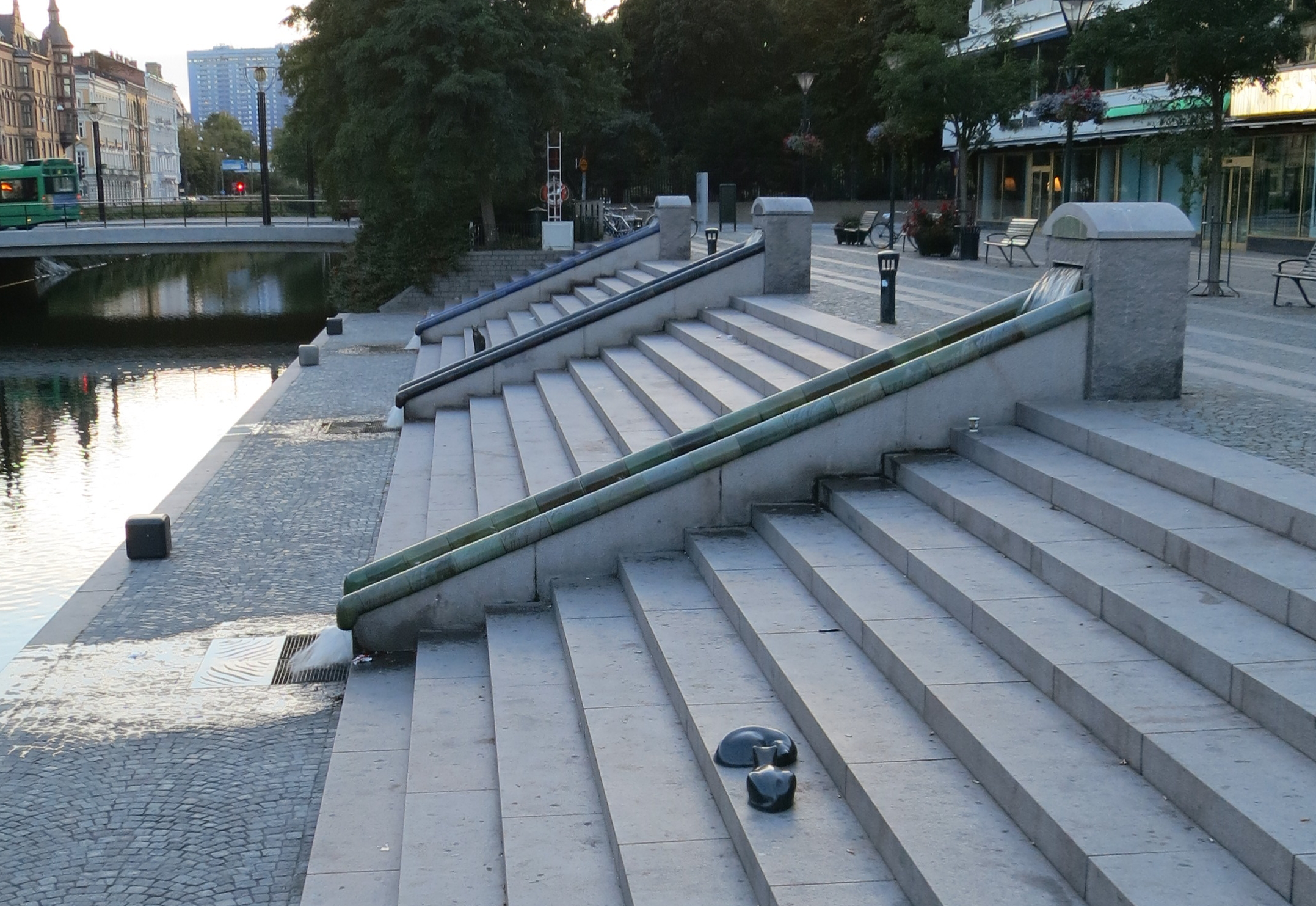 Katarakt, konstverk vid Södertull i Malmö